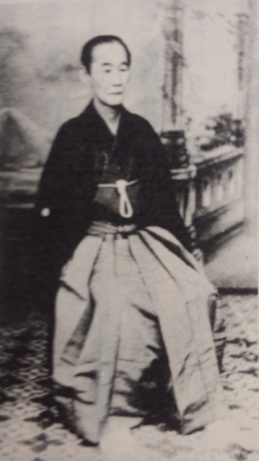 酒井忠惇の肖像写真。